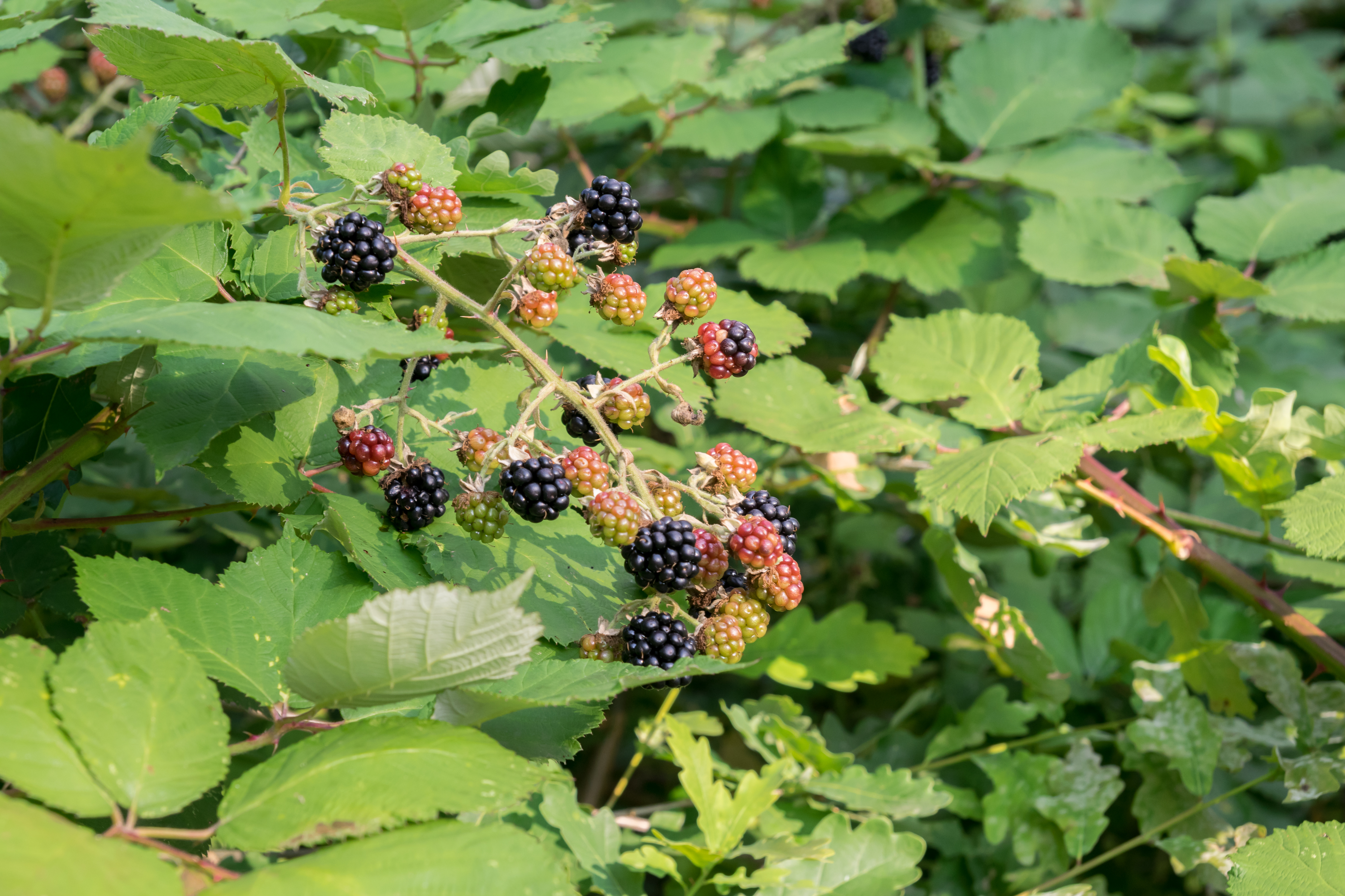 Brombeeren am Tallesee bei Schloß Neuhaus, LSG Seen in der Lippeniederung, Kreis Paderborn